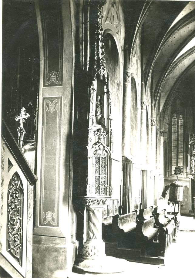 povodné gotické úložisko božieho tela, 14. stor, pred upravami 1956